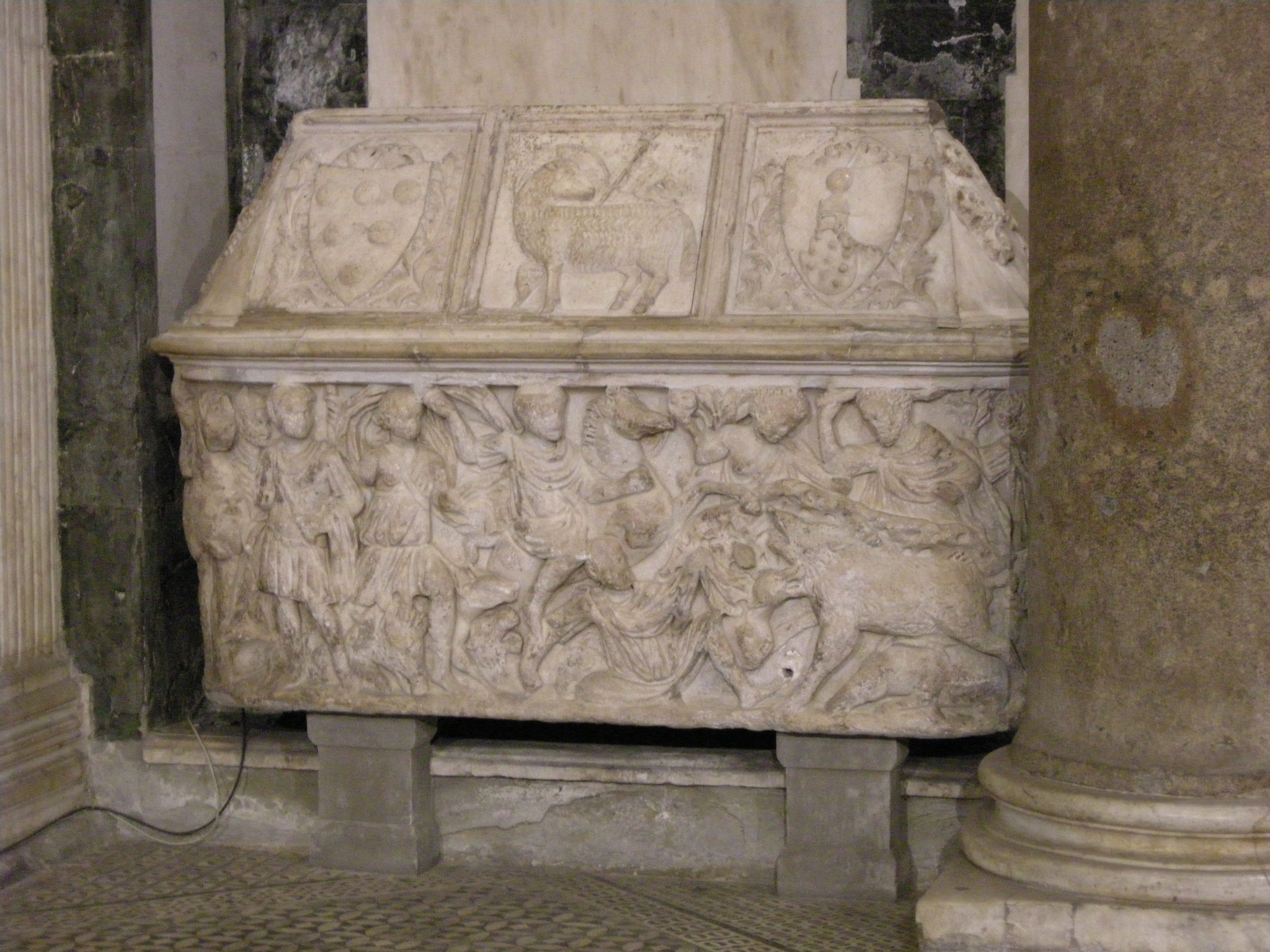 Sarcofaco romano con caccia al cinghiale e coperchio medievale con stemma medici, riusata per guccio de' medici